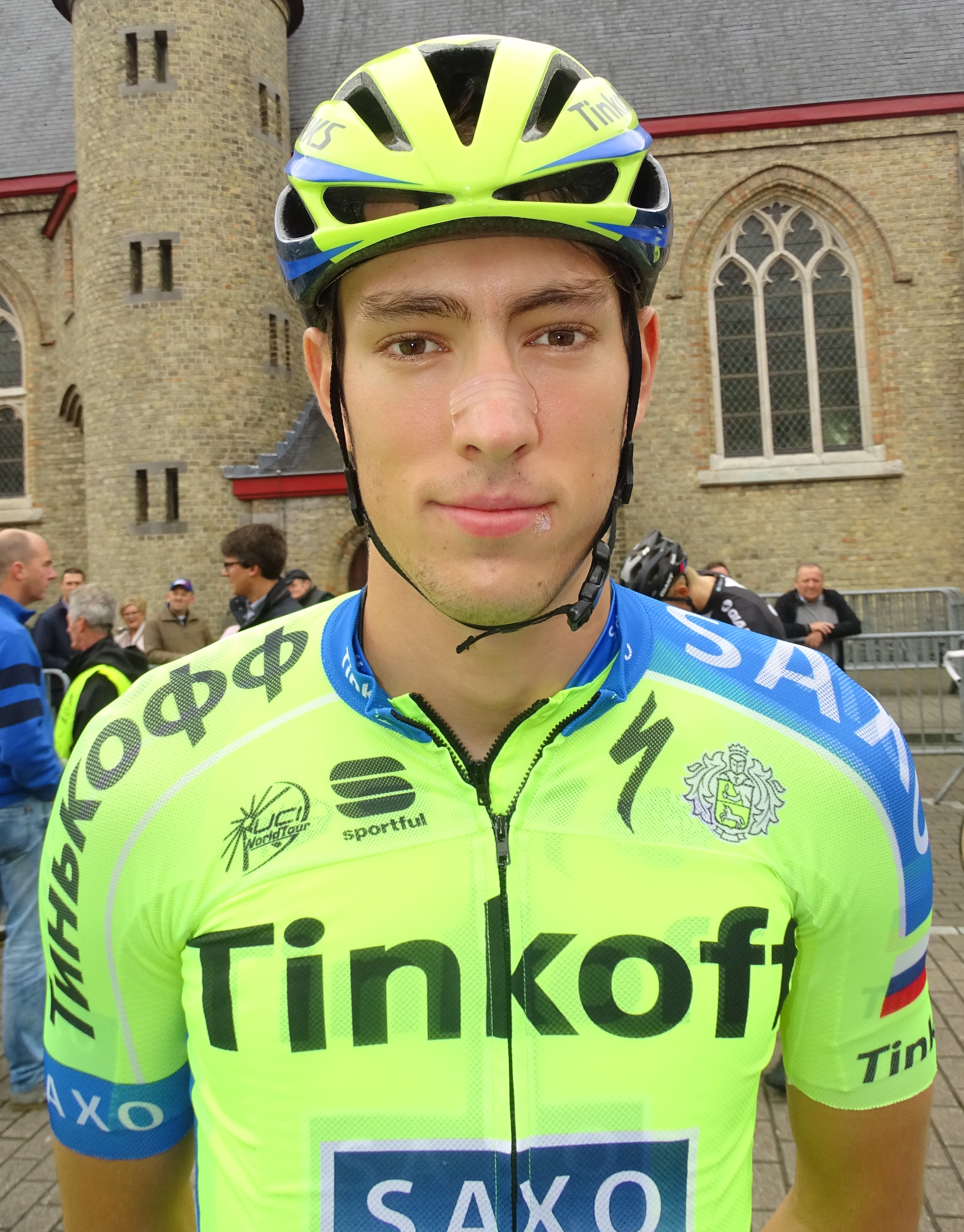 Reportage réalisé le vendredi 18 septembre à l'occasion de l'arrivée du Championnat des Flandres 2015 à Koolskamp (Ardooie), Belgique.